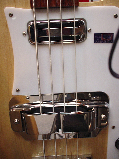 Rickenbacker Bass Horse Shoe Pickup